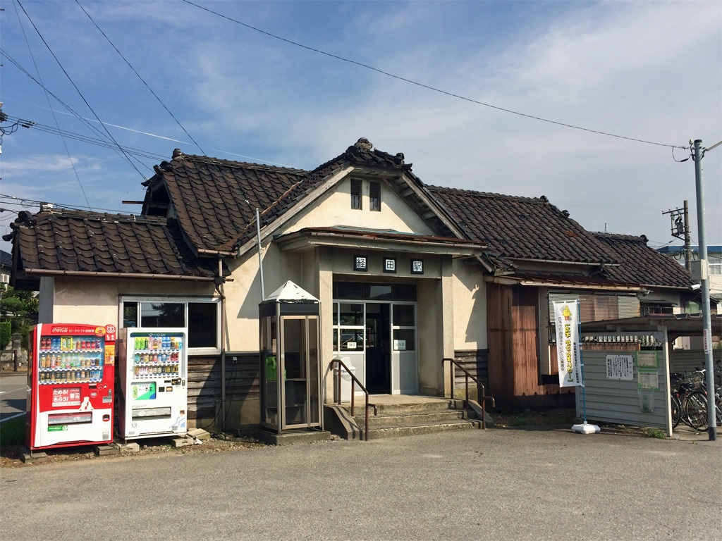 富山地方鉄道本線経田駅駅舎